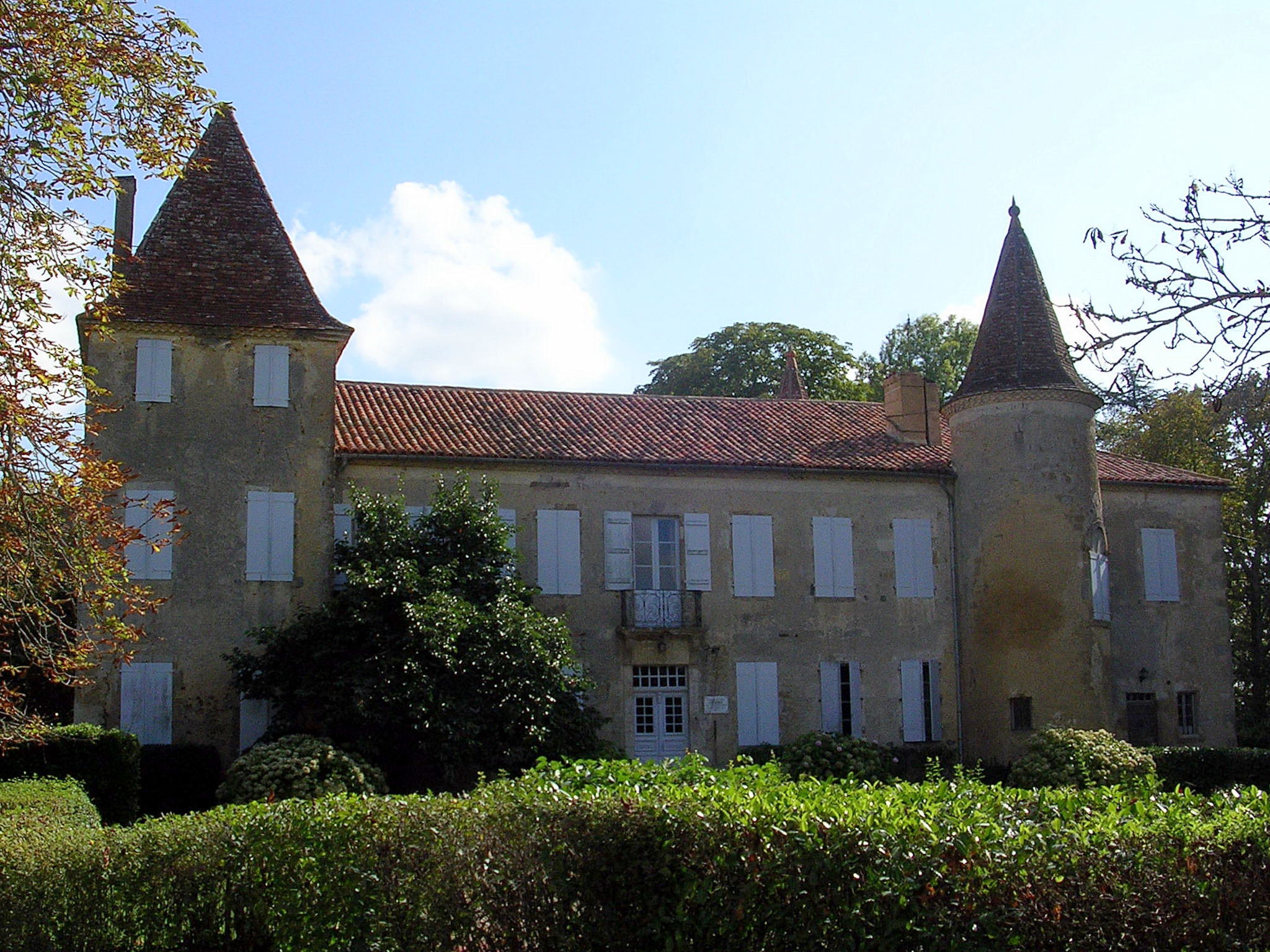 Château de Castelmore, à Lupiac, dans le Gers (France). Ce château (privé) est connu pour être le lieu de naissance (vers 1615) de Charles de Batz, plus connu sous le nom de d'Artagnan. Il s'agit ici du personnage historique, qui inspira le personnage d'Alexandre Dumas dans son roman Les Trois Mousquetaires.